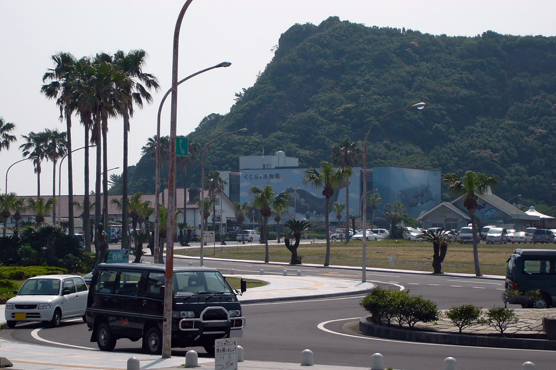 Taiji Whele Museum in Taiji, Wakayama prefecture, Japan